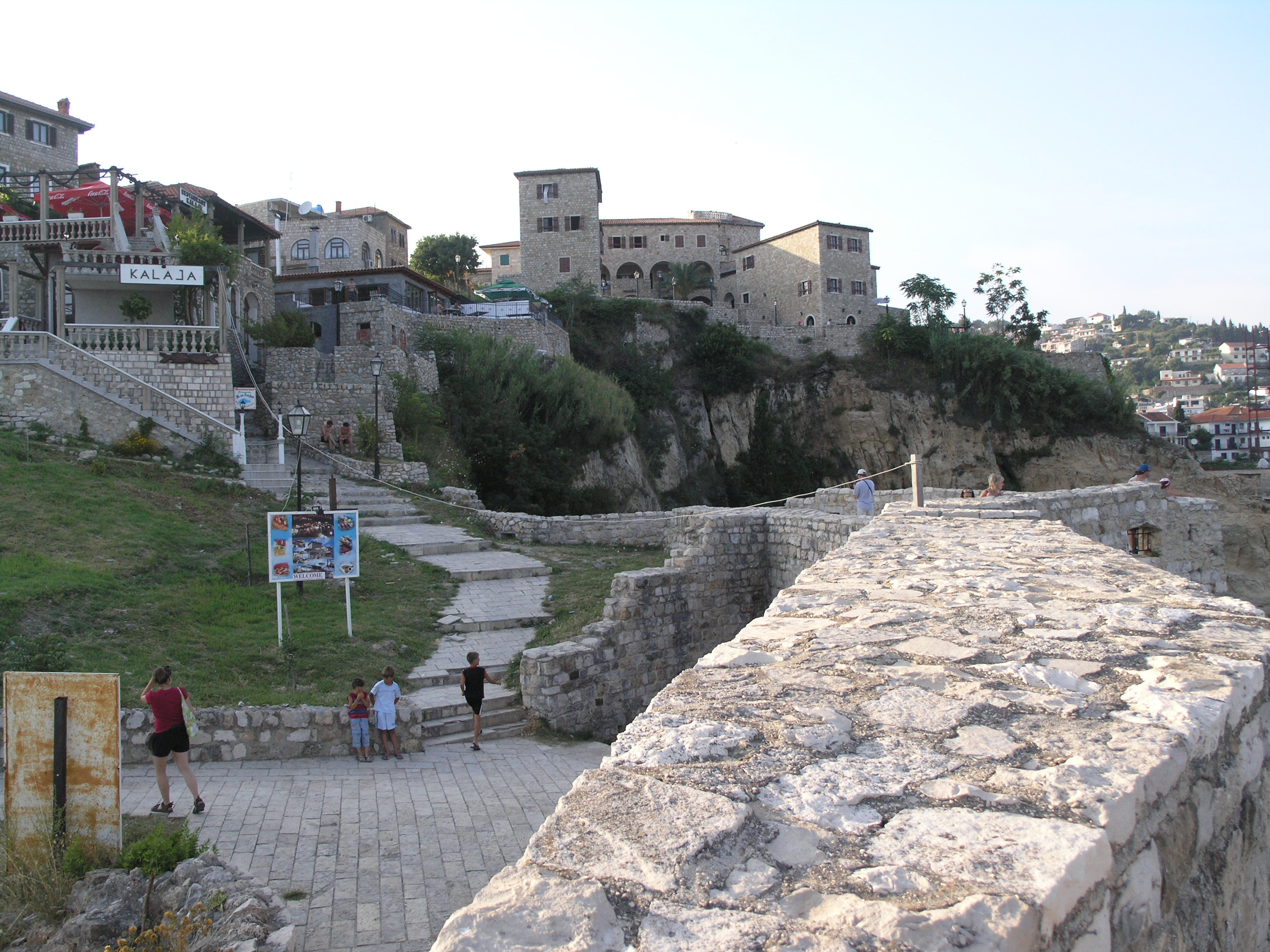 Černá Hora, Ulcinj - staré město